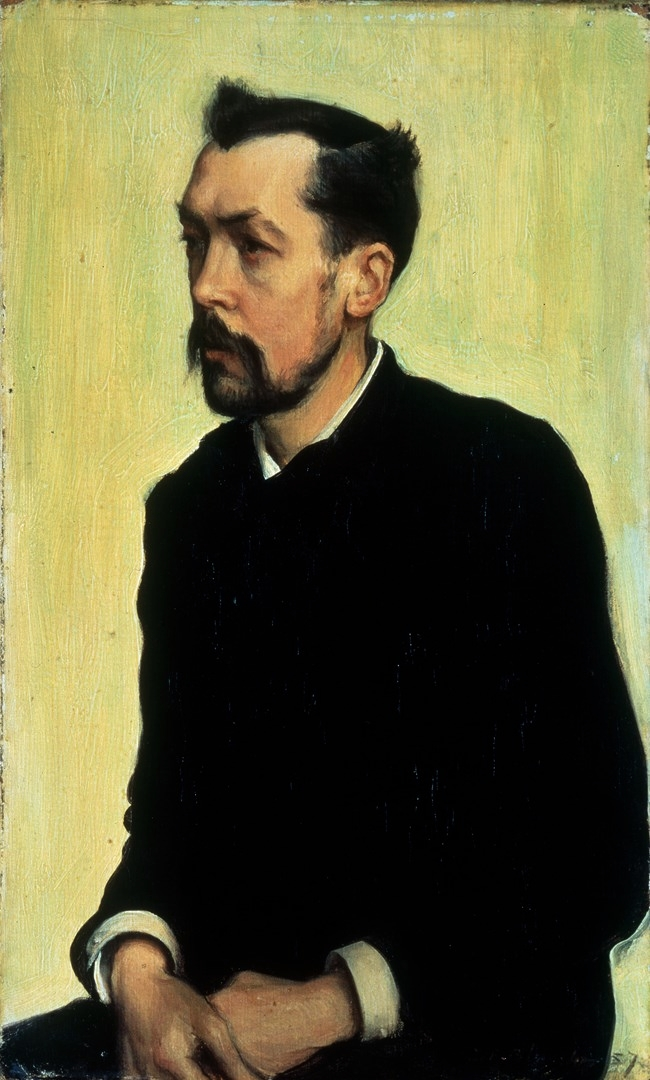 Portrait de Francis Poictevin, huile sur toile par Jacques-Émile Blanche, 1887, 26.7 x 16.5 cm. National Gallery Londres.